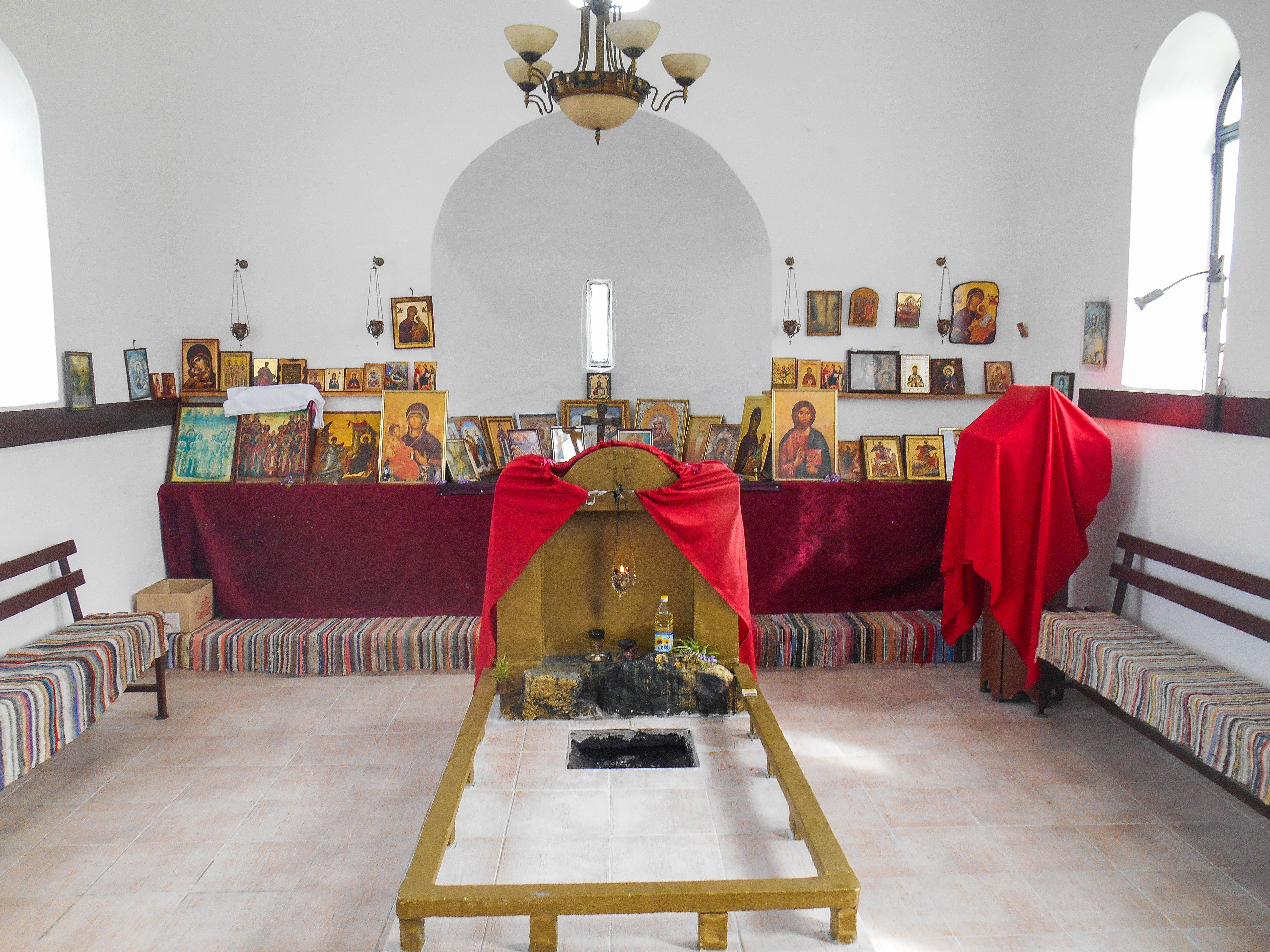 Црква „Св. Петнаесет тивериополски маченици“ - Куклиш